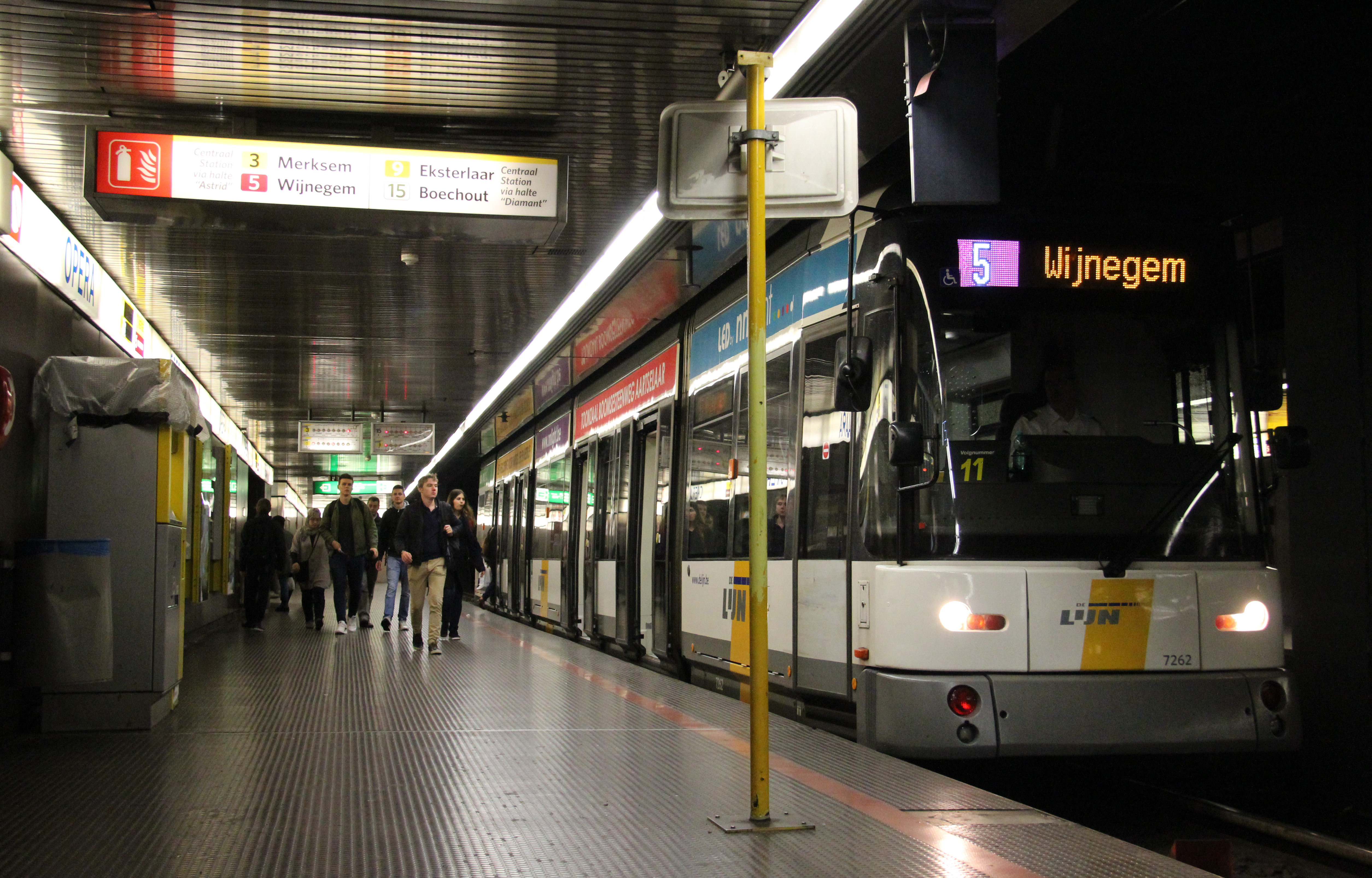 Een Hermelijntram in premetrostation Opera.